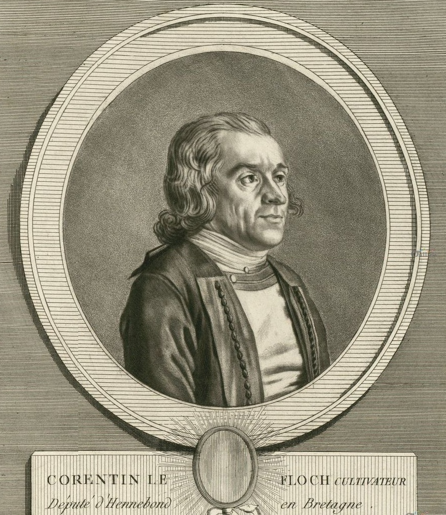 Corentin Le Floch, cultivateur à Lignol, député du tiers état de la sénéchaussée d'Hennebont aux Etats généraux Gravure publiée chez Le Vachez, à Paris, en 1789